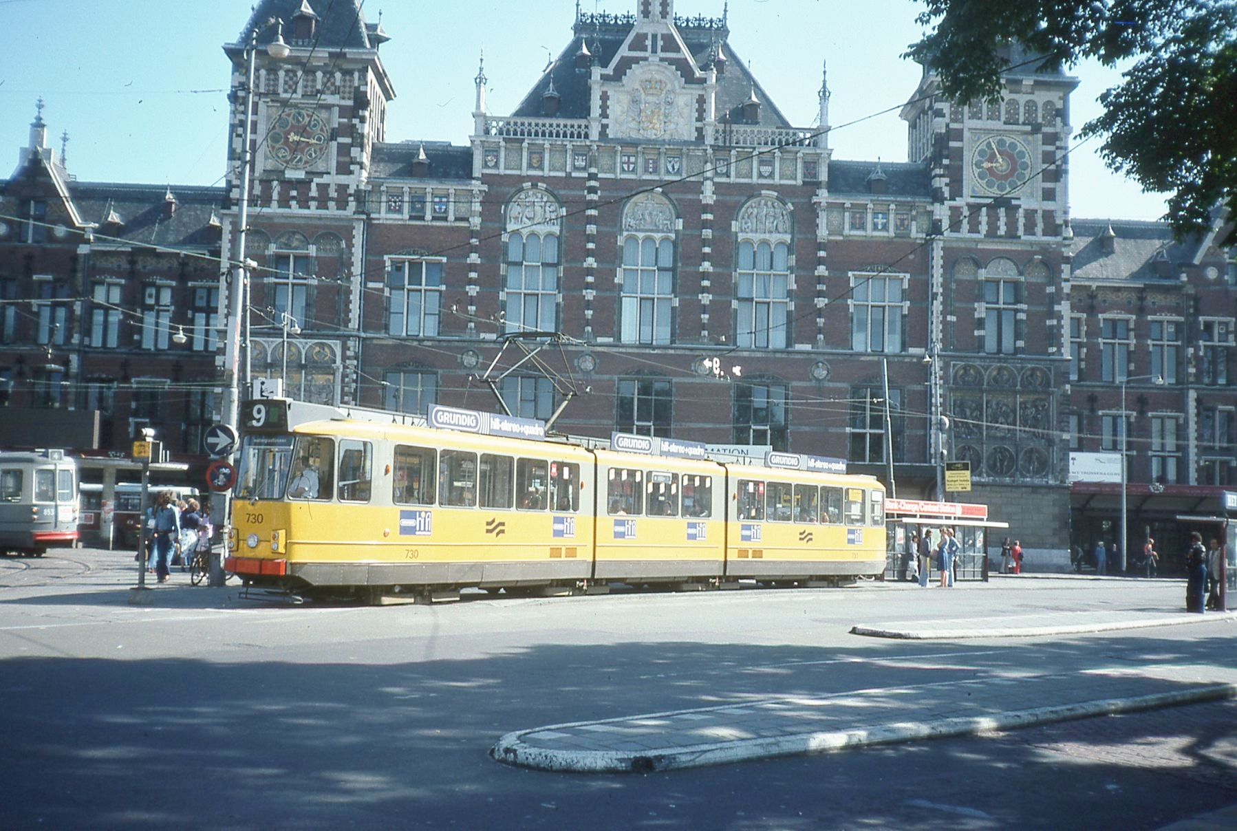 Photo. Trams aux Fils. Prise en juin 1976 Ligne 9 à la Gare Central Tram 730